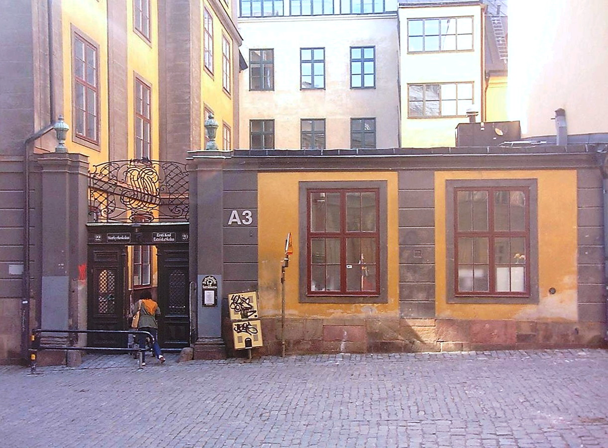 Ehrenstrahlska huset ("House of Ehrenstrahl") today housing the Storkyrkoskolan ("School of the Great Church", e.g. Storkyrkan) at 20, Svartmangatan, Gamla stan, Stockholm.